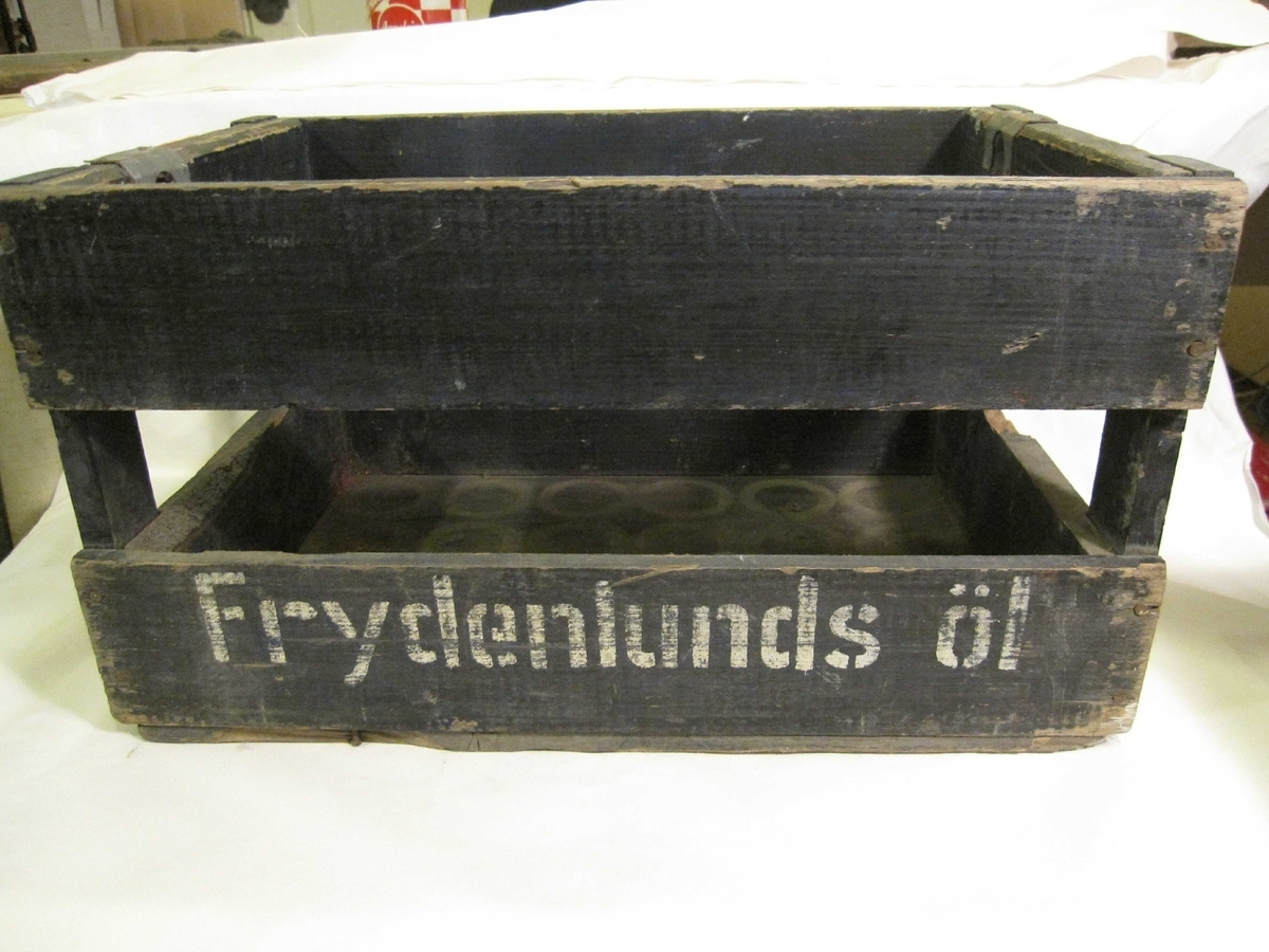 Ølkasse med påmalt tekst Frydenlunds øl. Enkelt laget.